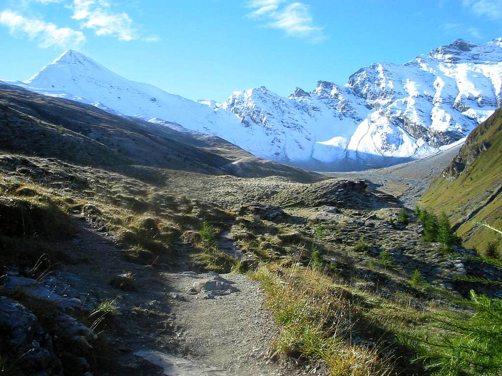 Muttler and Piz Tschütta, Samnaun Alps